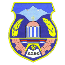 Grb opstine Leposavić